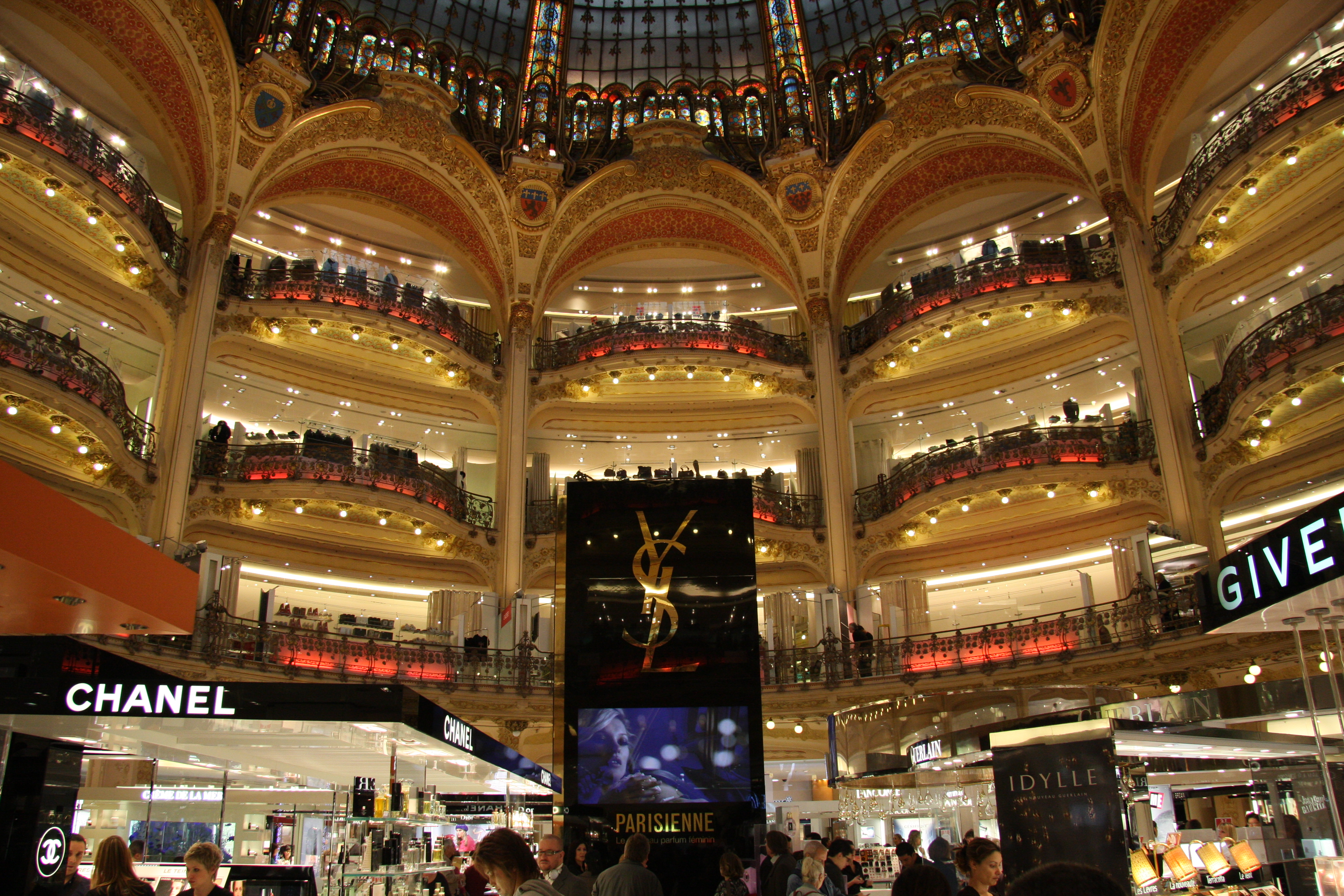 Octubre 2009